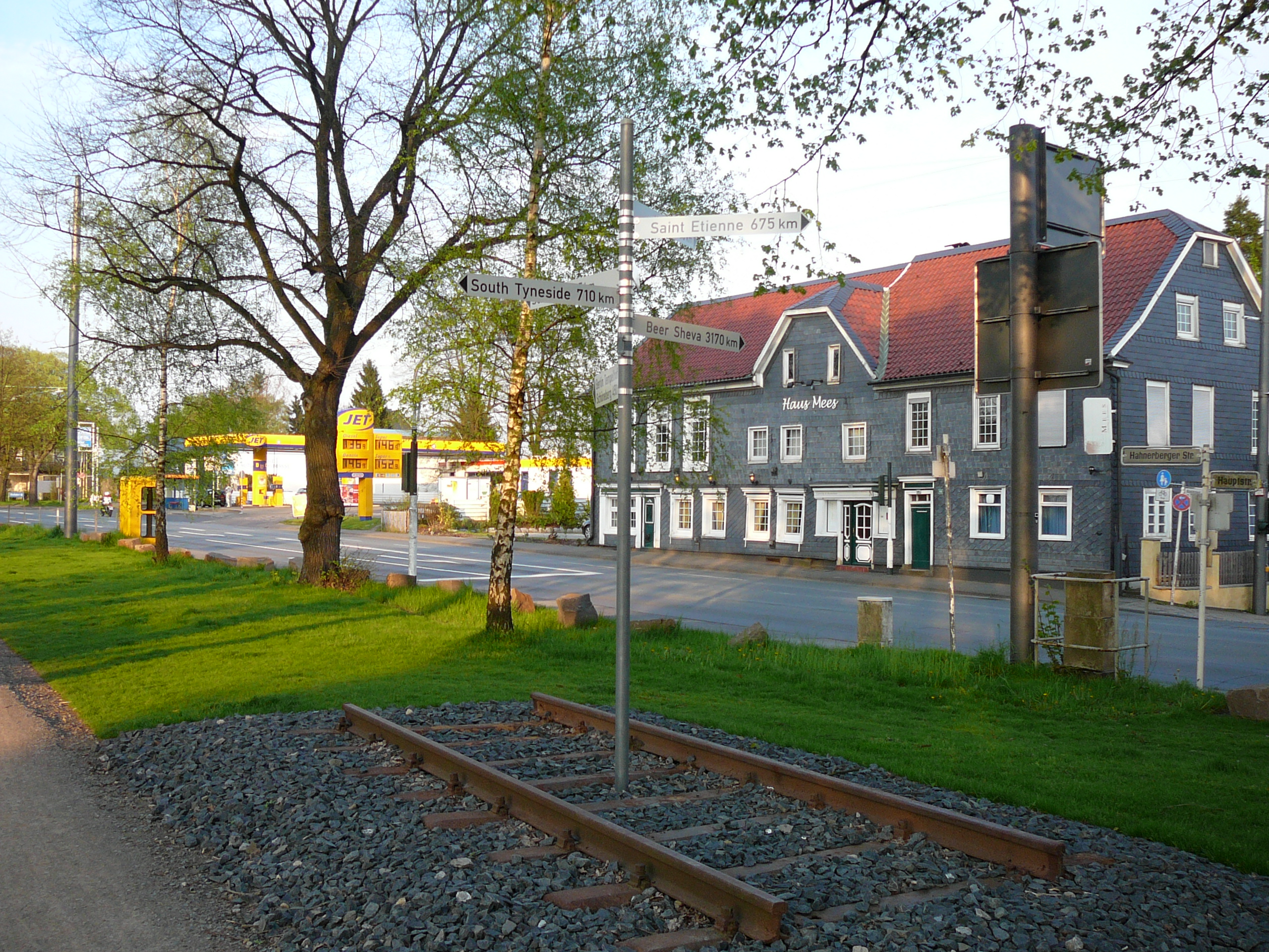 Hauptstraße, Wuppertal